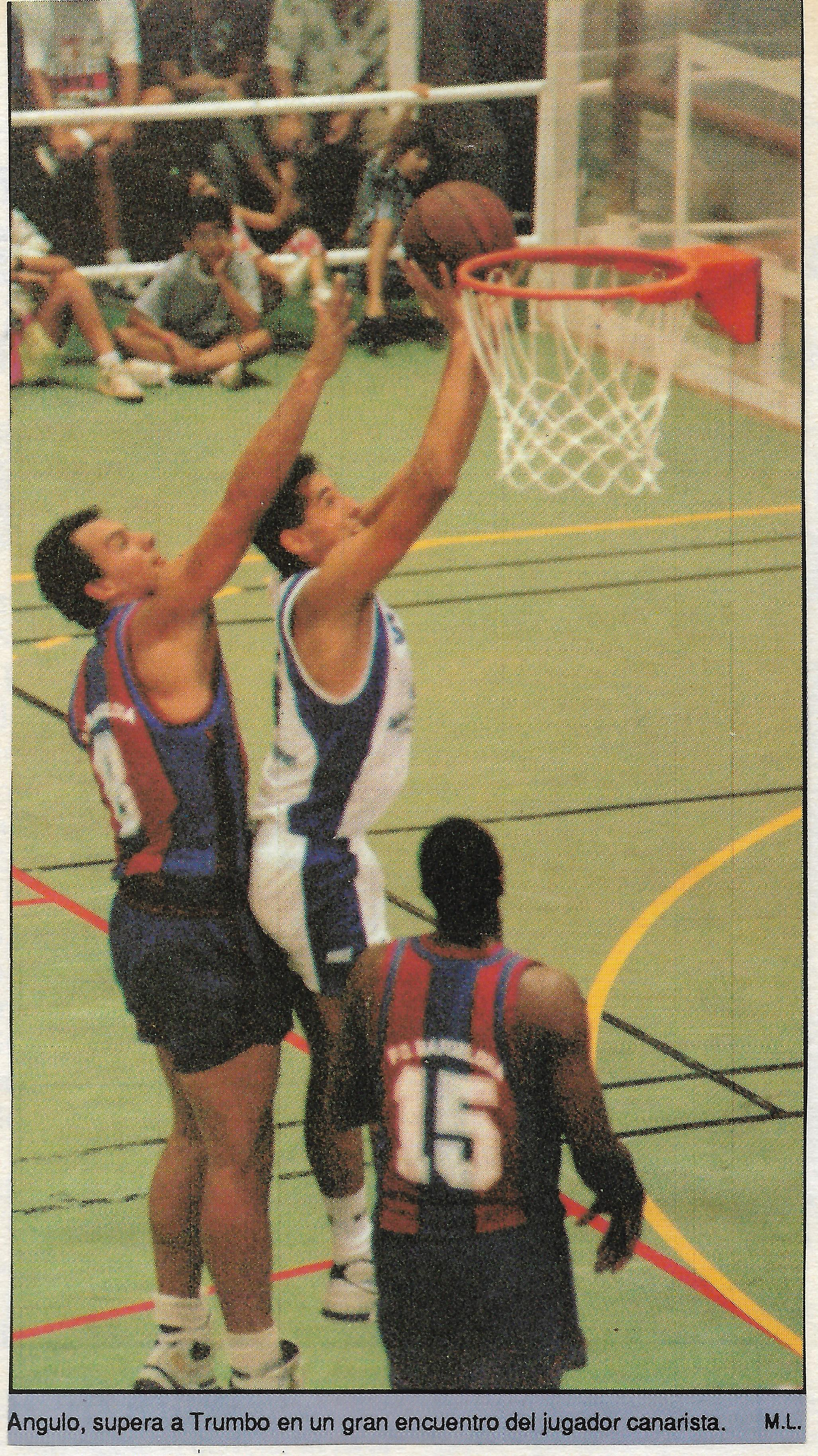 Partido amistoso C.B. Canarias - F.C. Barcelona